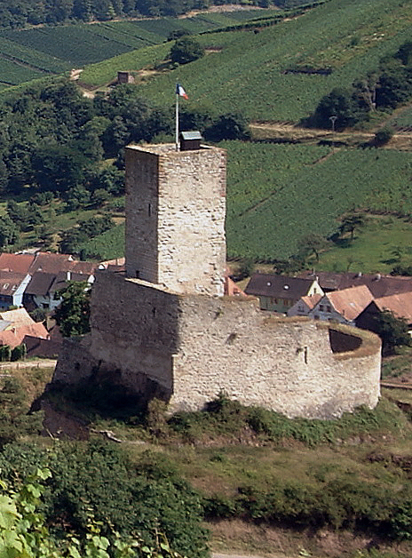 Die Burgruine Winecke in Katzenthal, Haut-Rhin, Frankreich, von Nordwesten gesehen